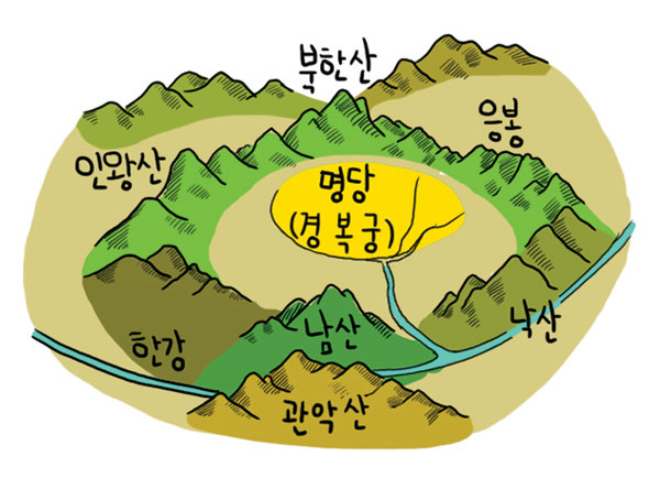 한양의 명당입지를 나타낸 그림